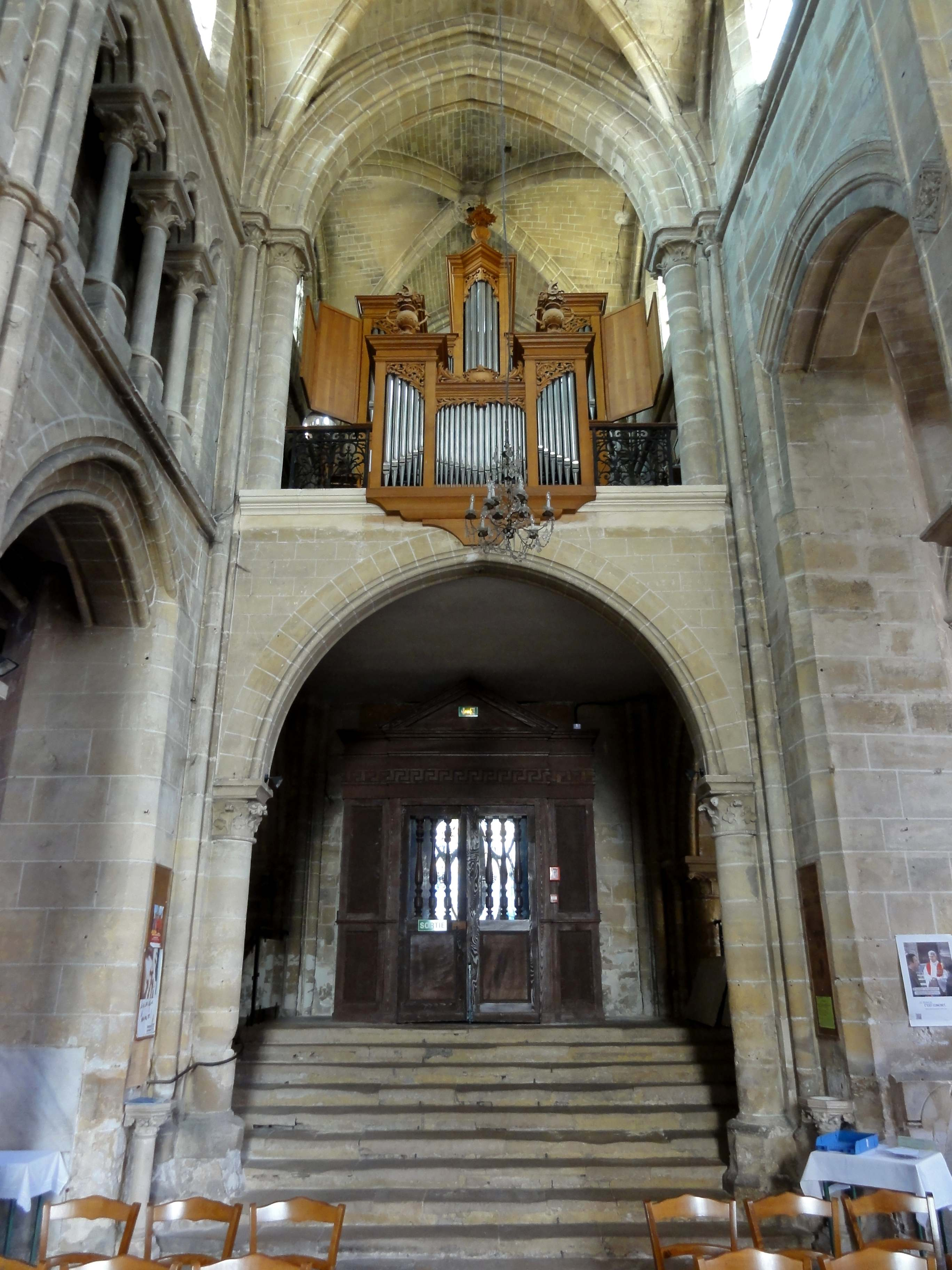 Intérieur de l'église - voir titre.